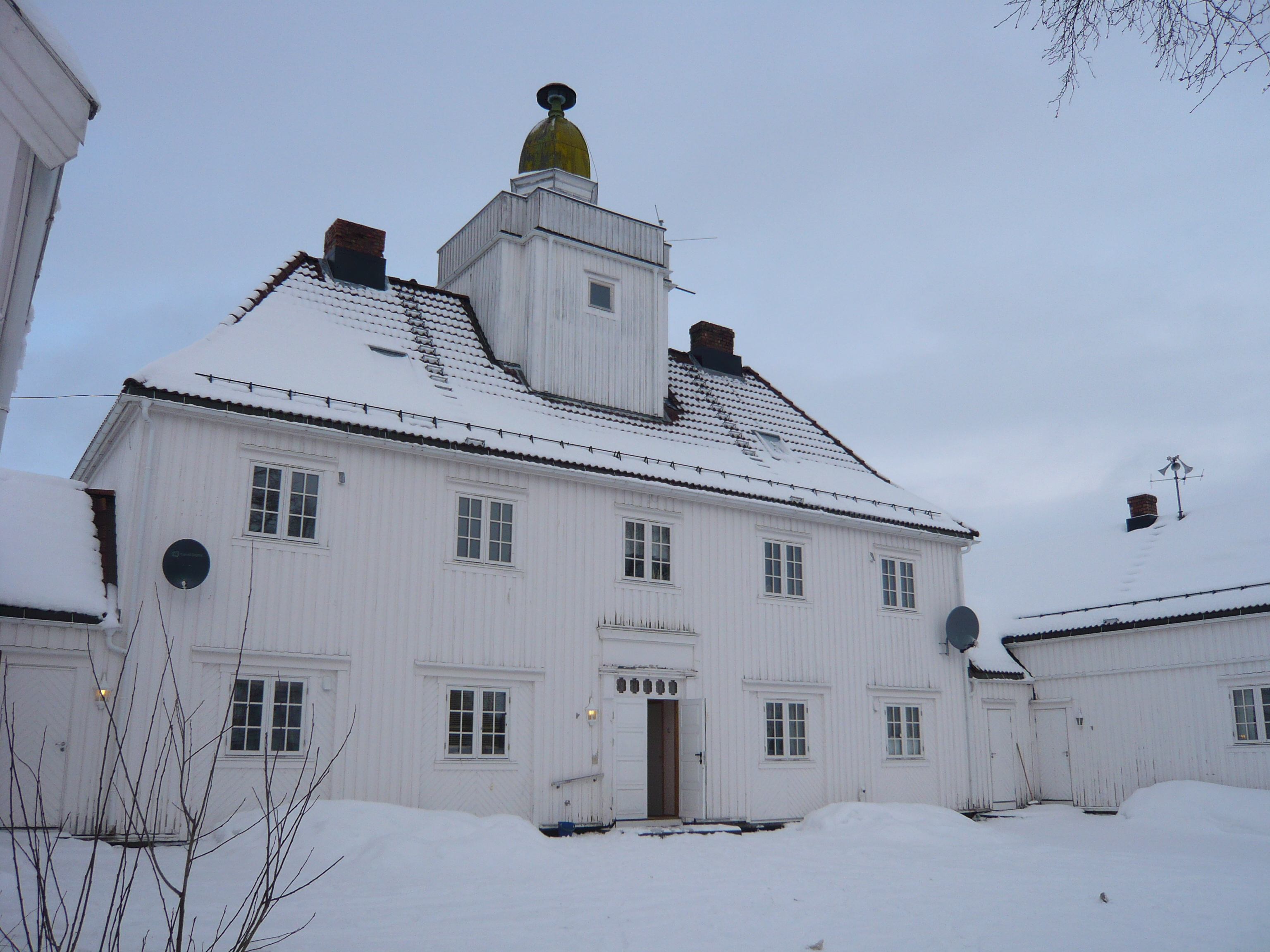 Den gamle brannstasjonen i Bjørnli Haveby, Løkken Verk. Nå ombygd til leiligheter og forsamlingslokale